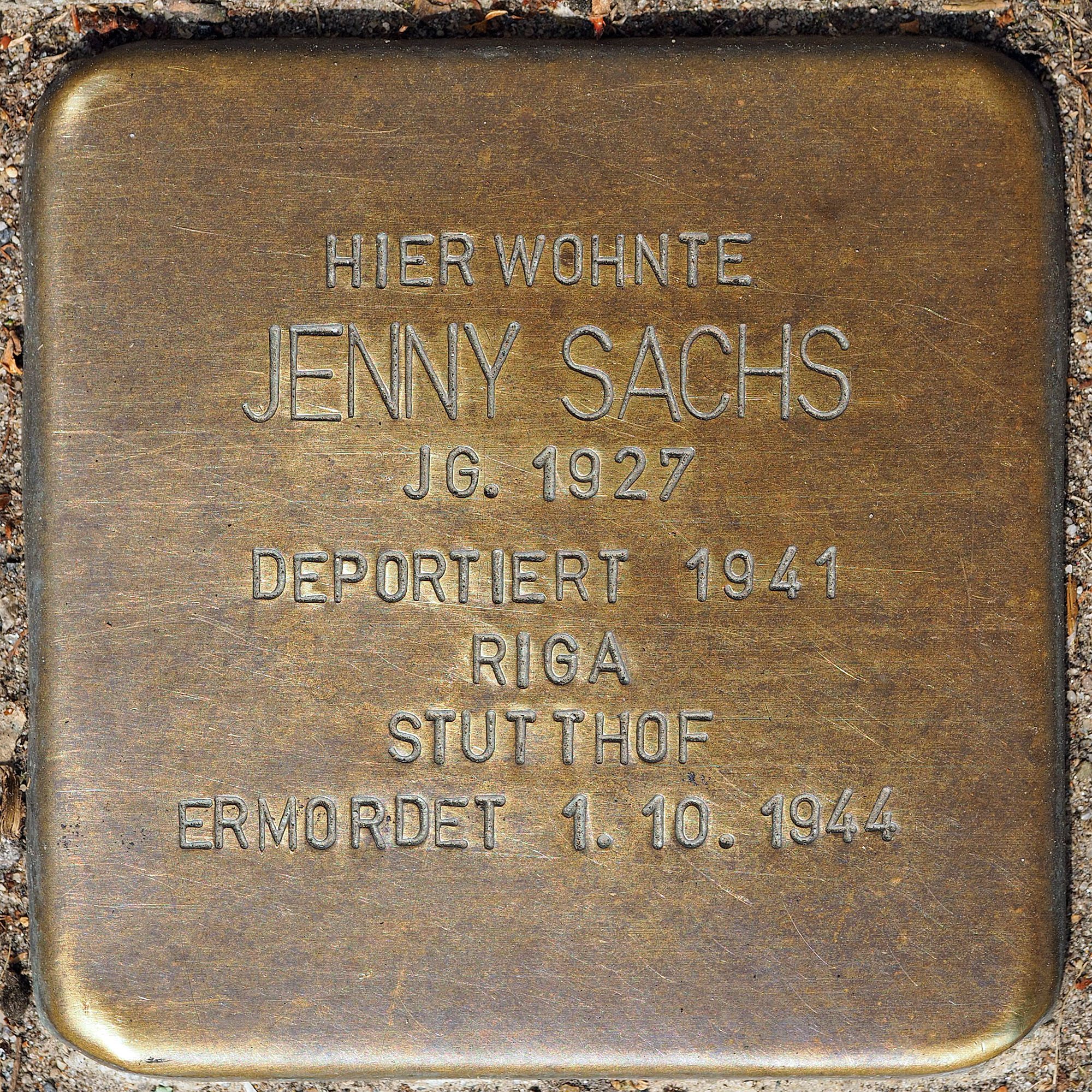 Stolpersteine GV: Sachs, Jenny